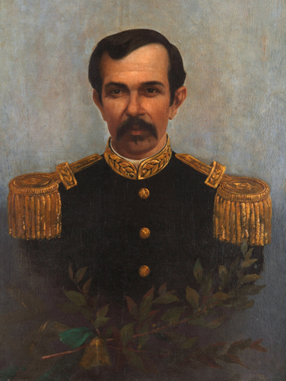 Pintura de Floriano Vieira Peixoto da Presidência da República Federativa do Brasil.